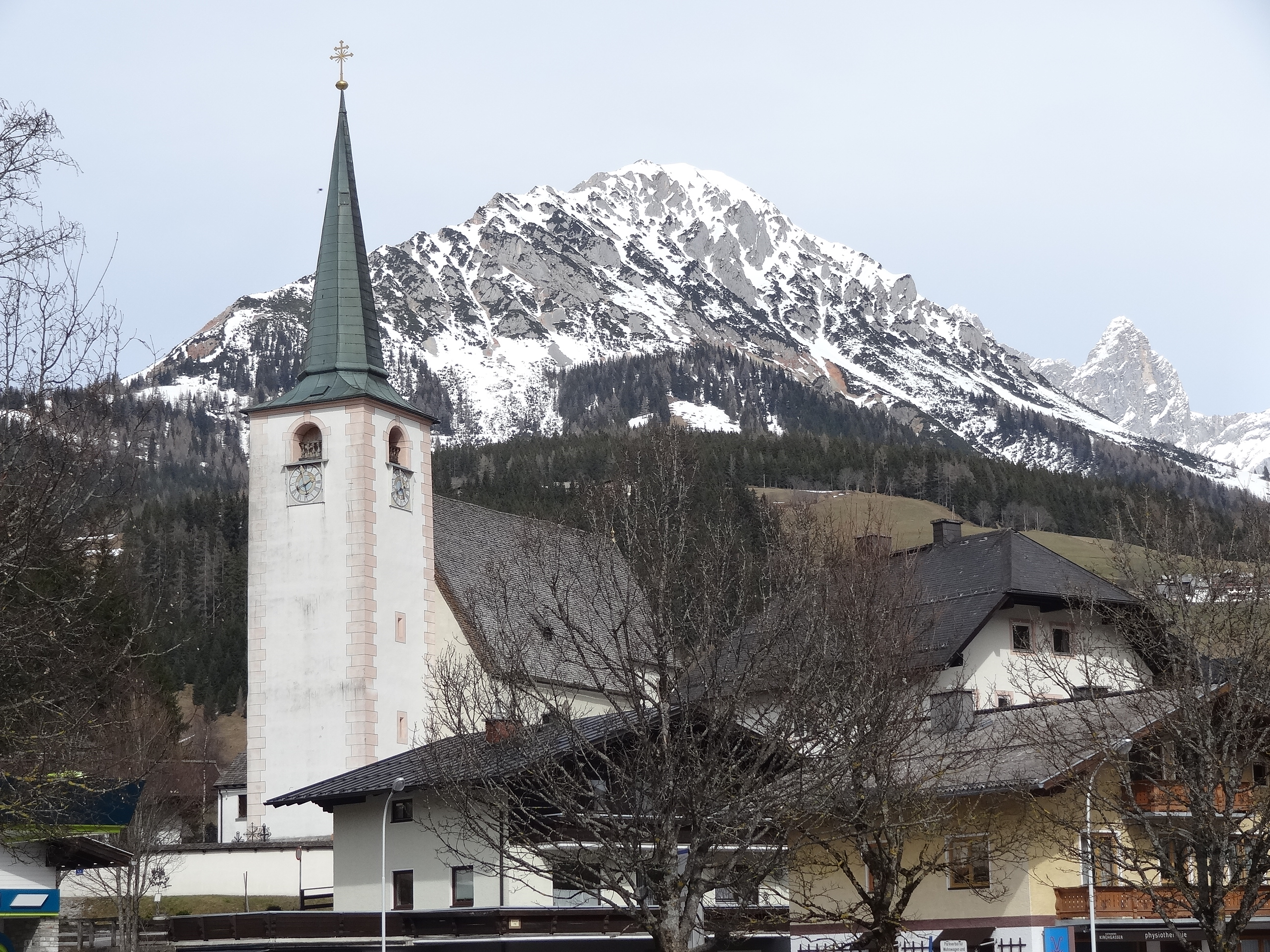 Saints Peter and Paul Church (Filzmoos)